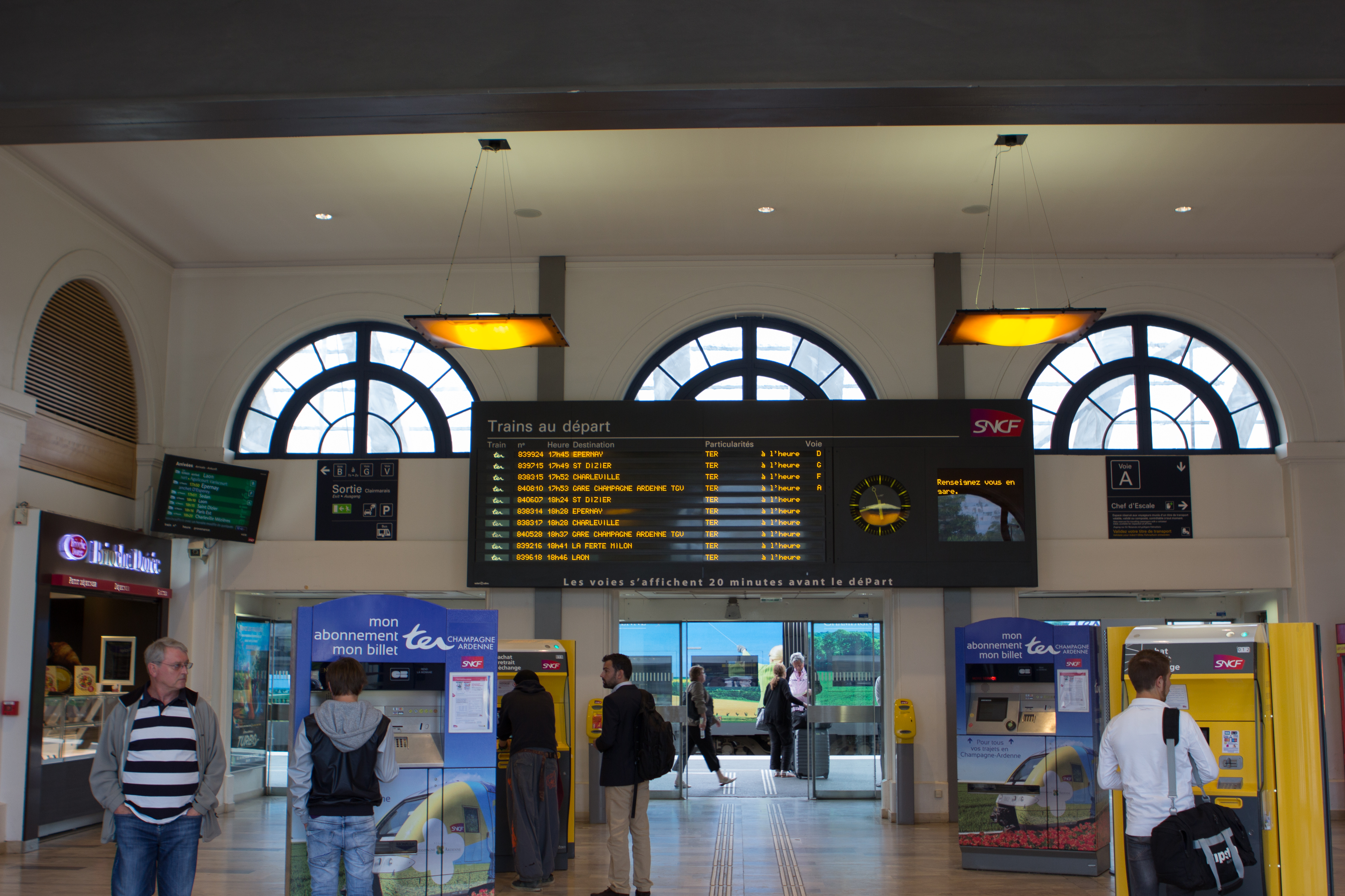 Intérieur du bâtiment voyageur de la gare de Reims / Reims, Marne, France